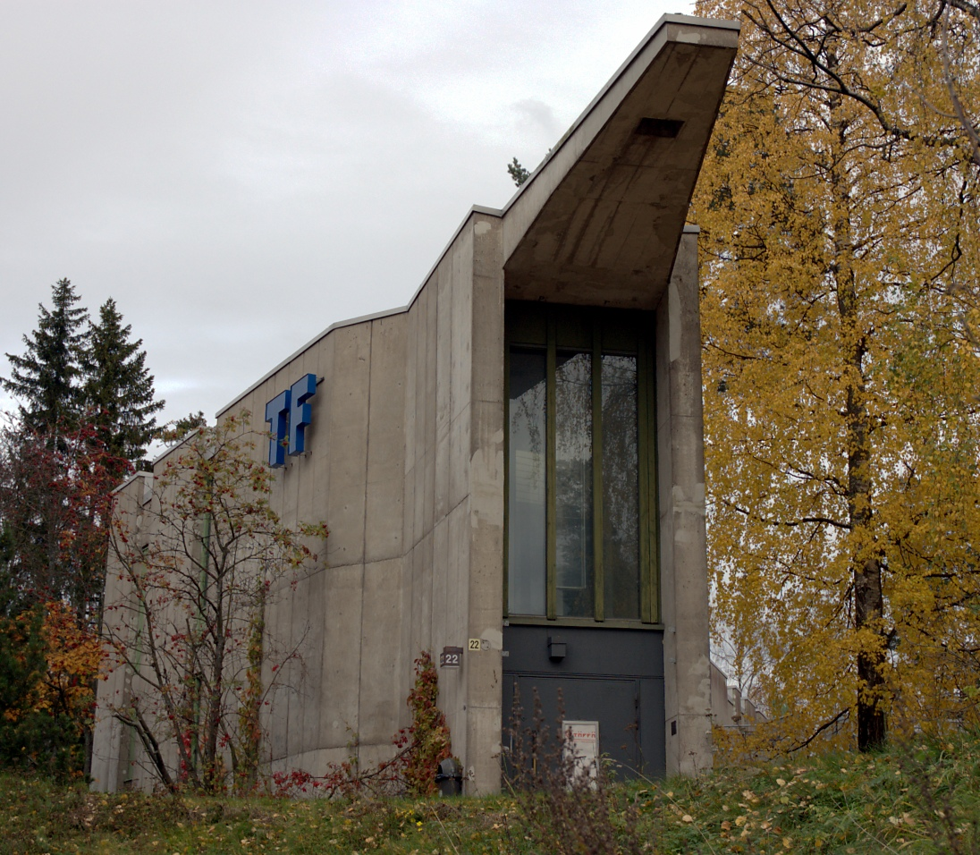 TF:n "Urdsgjallar" Espoon Otaniemessä.